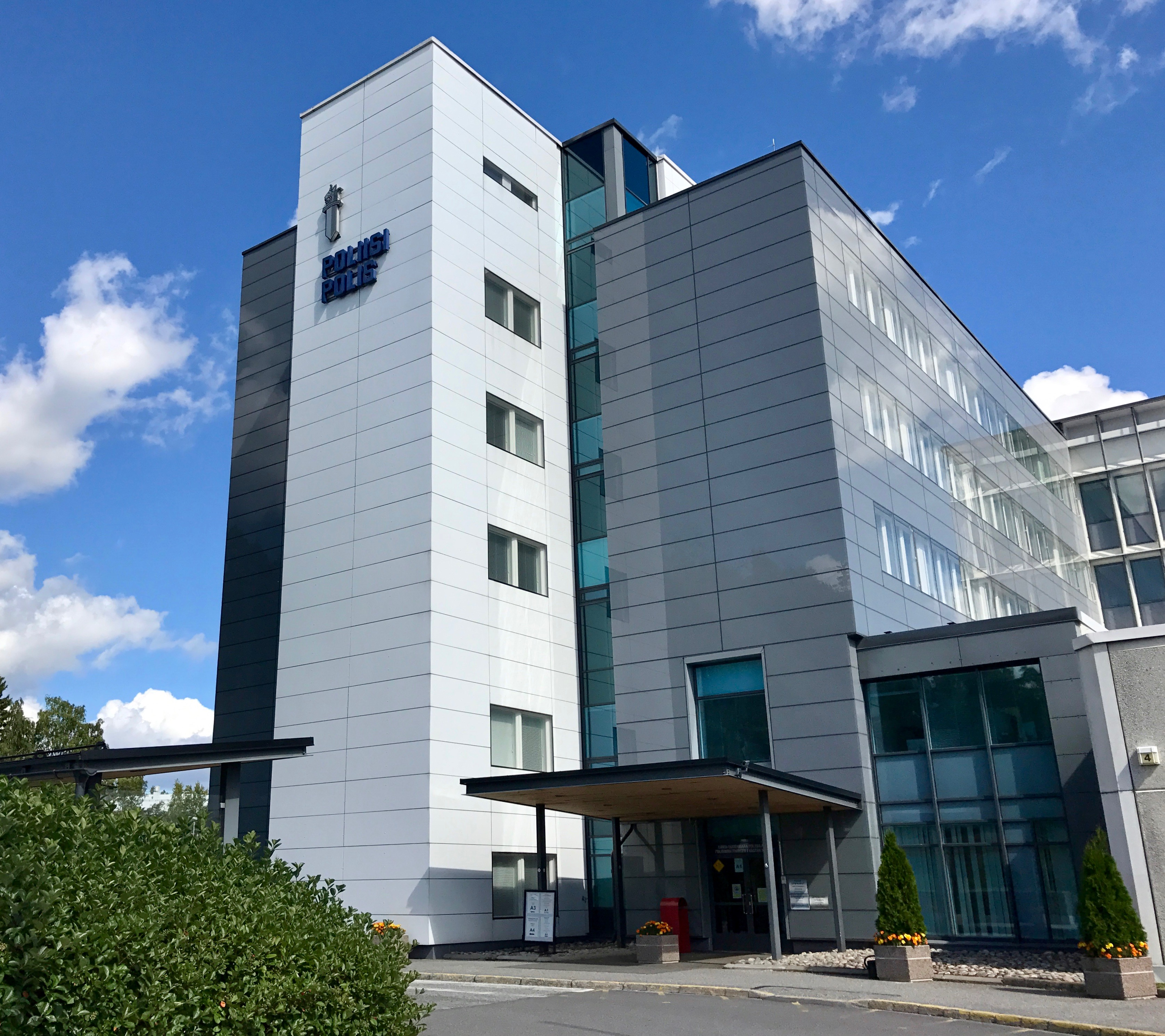 Espoon pääpoliisiasema Kilossa.